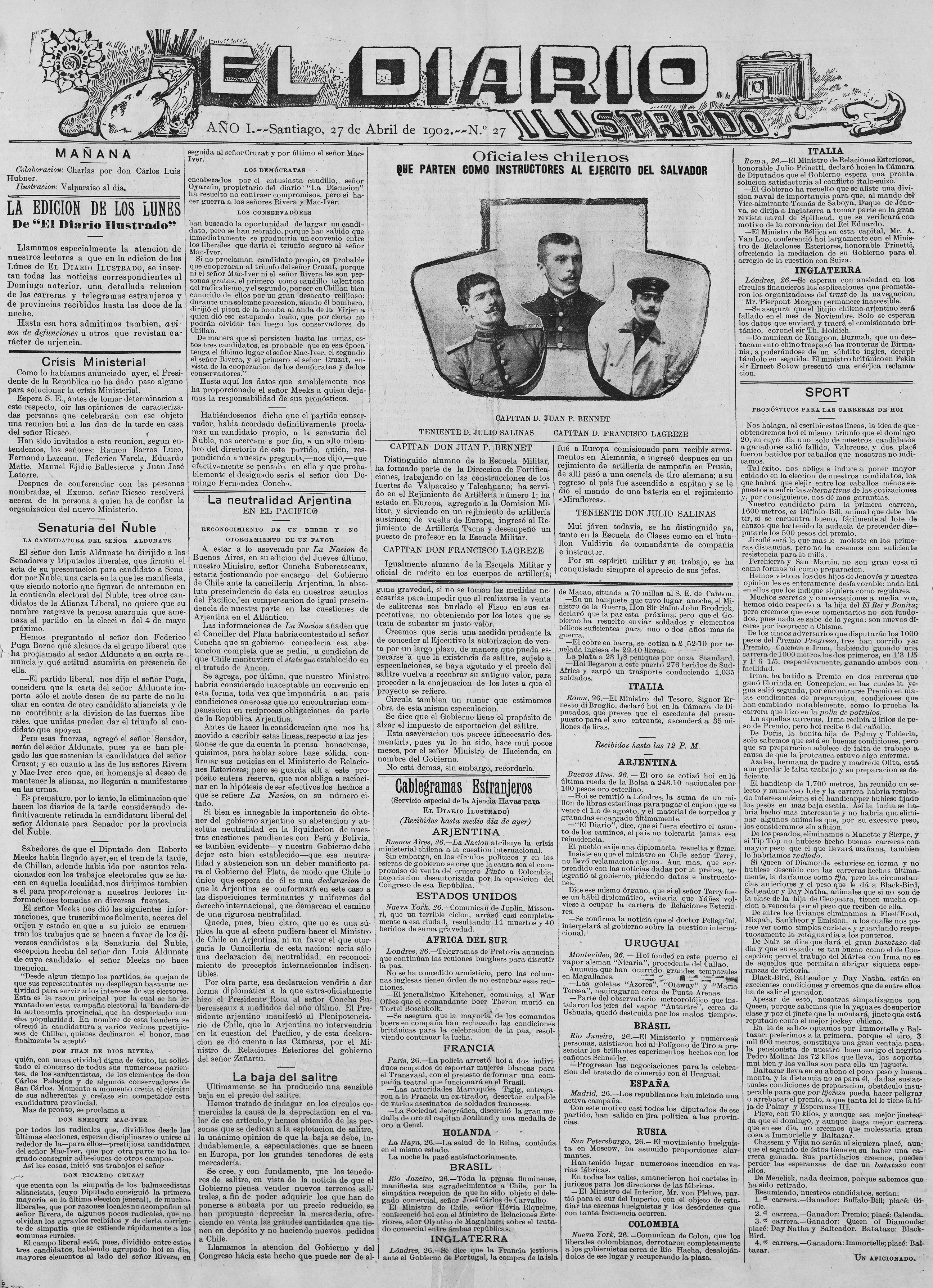 Portada de El Diario Ilustrado del 27 de abril de 1902